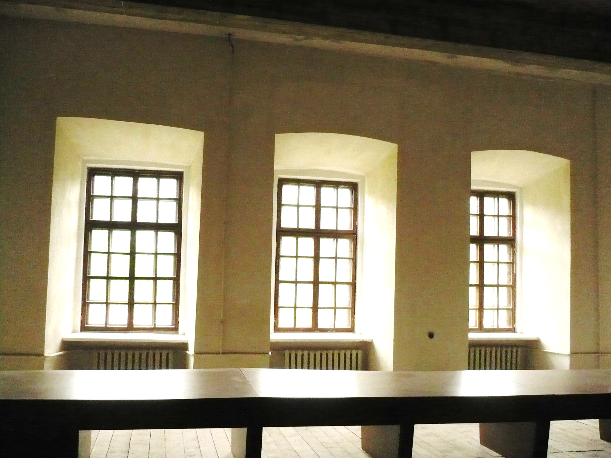 Zbaraż, sala zamku